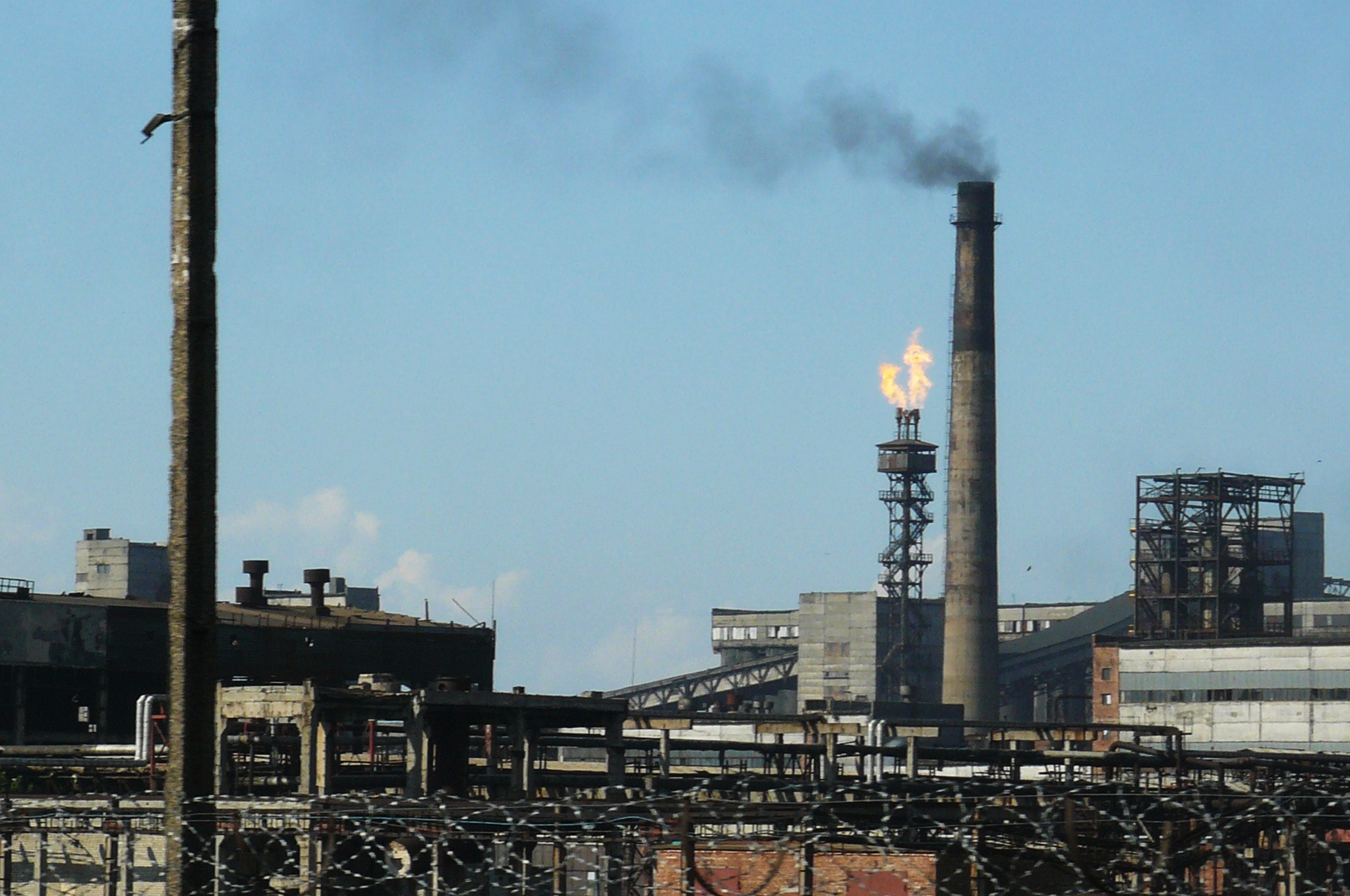 Coke-chemical plants. Avdijivka.